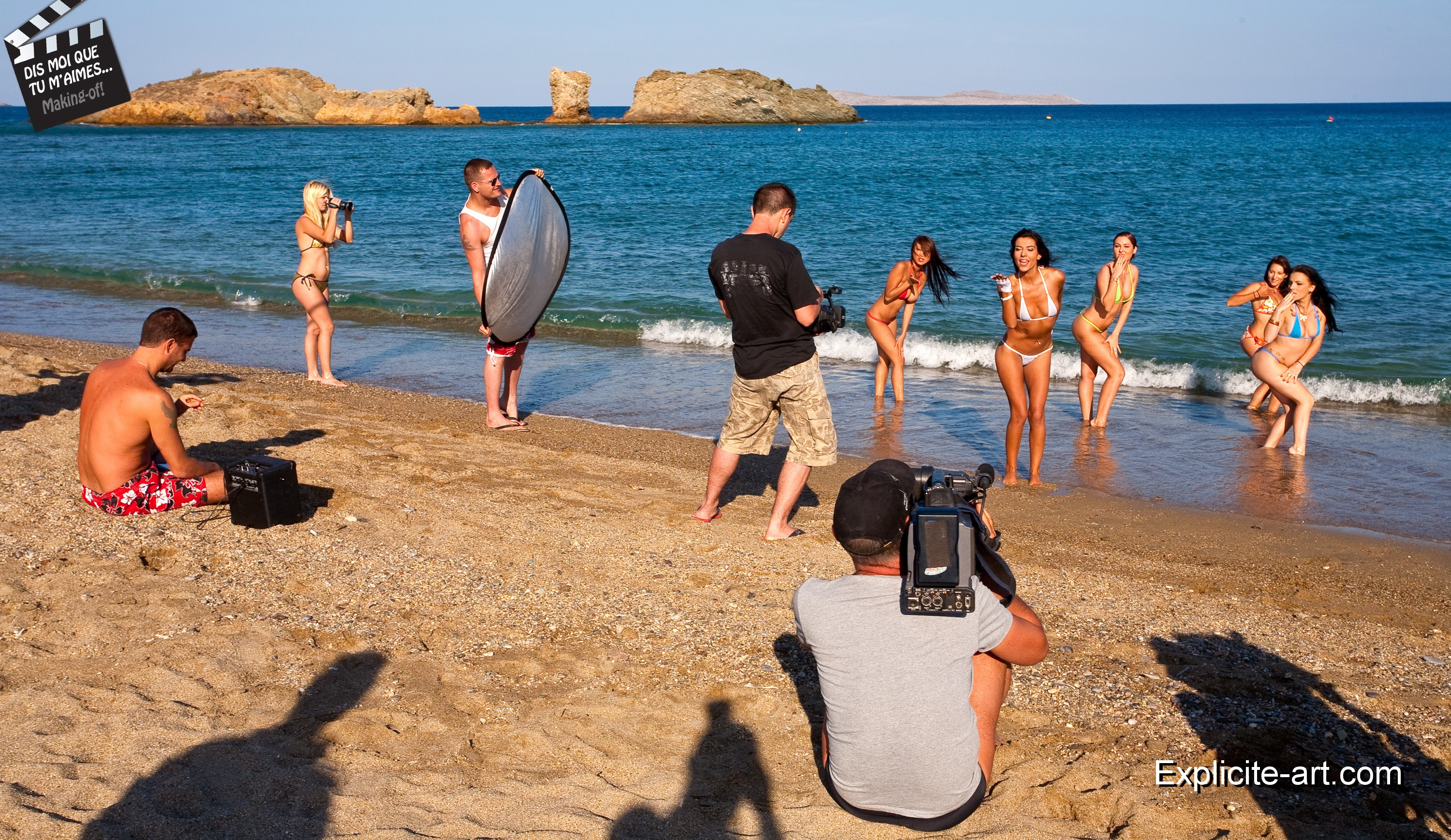 Photo de tournage de "Dis-moi que tu m'aimes", de John B. Root